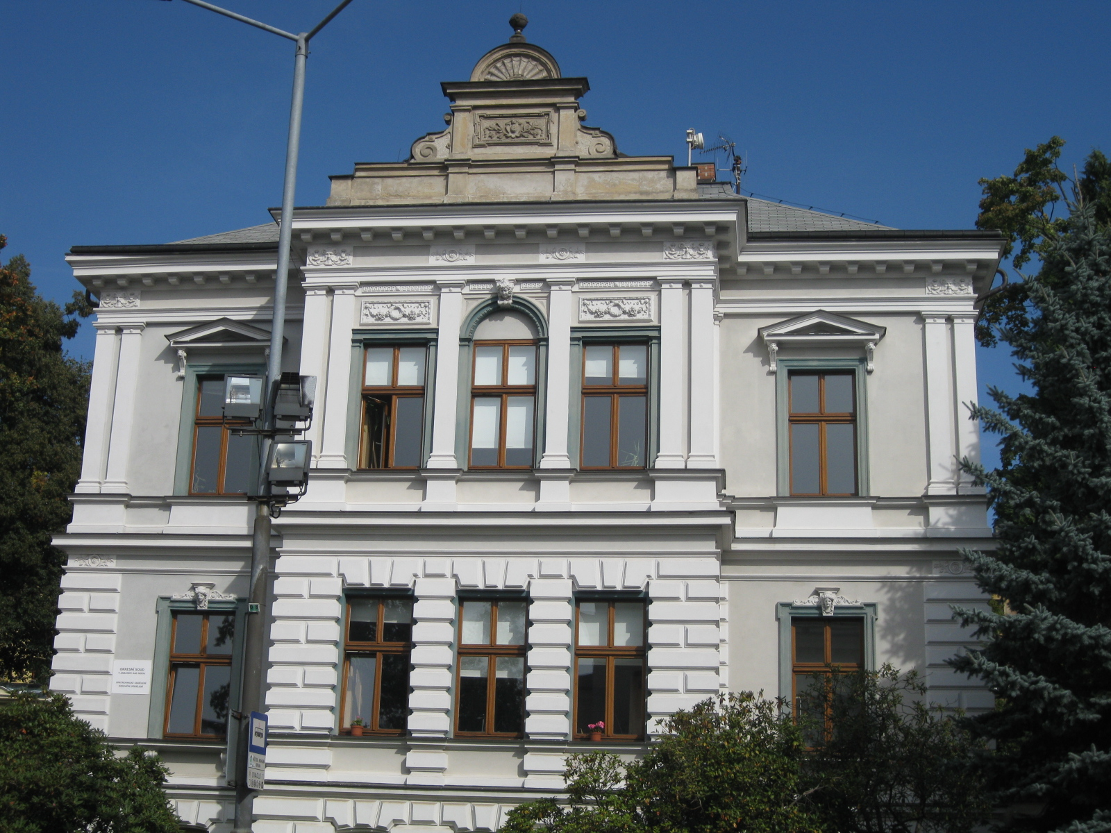 Vila (Jablonec nad Nisou), Liberecká 902/6, Jablonec nad Nisou